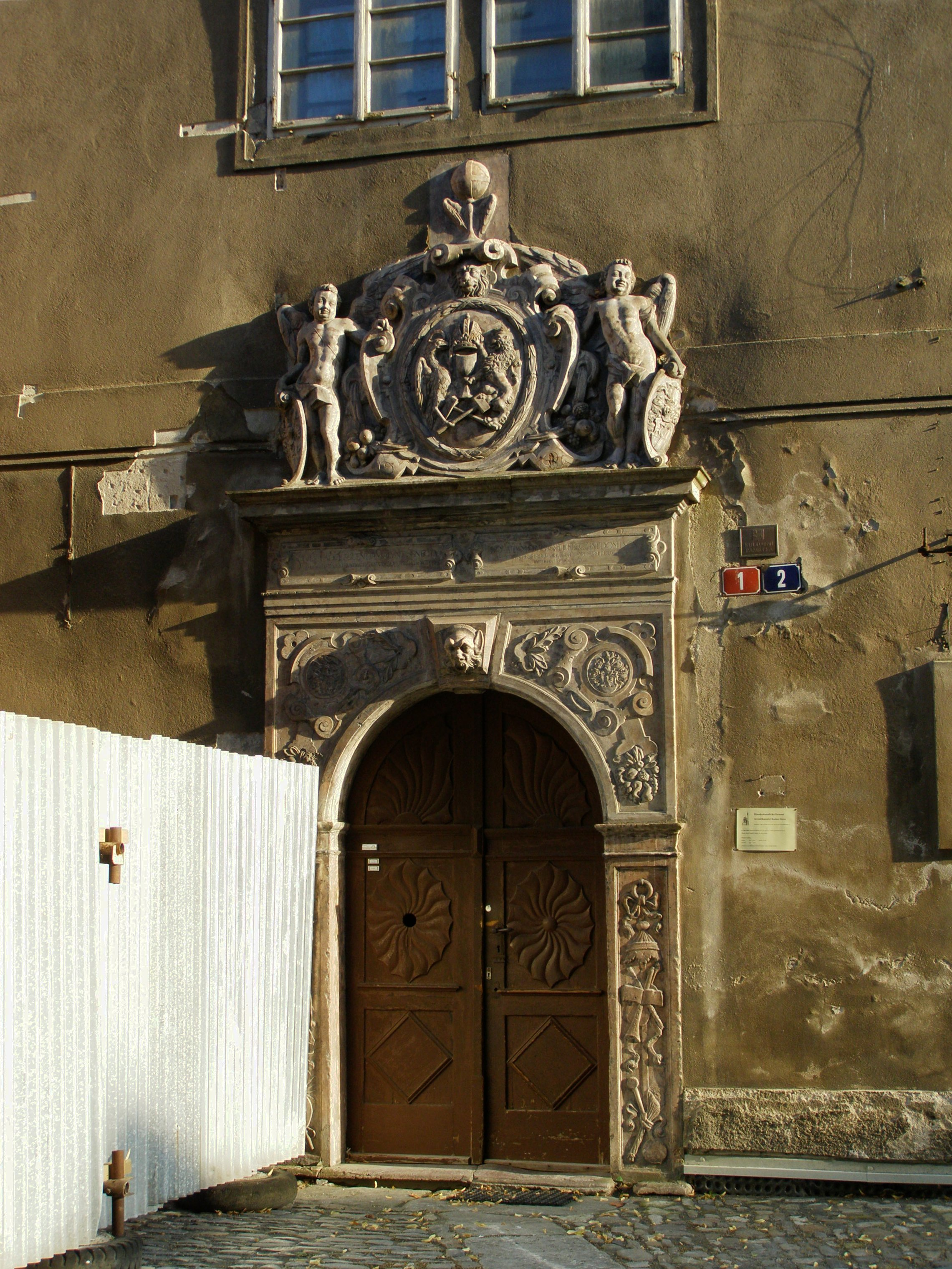 Kutná Hora, část Kutná Hora-Vnitřní Město, ulice Jakubská, vchod do děkanství